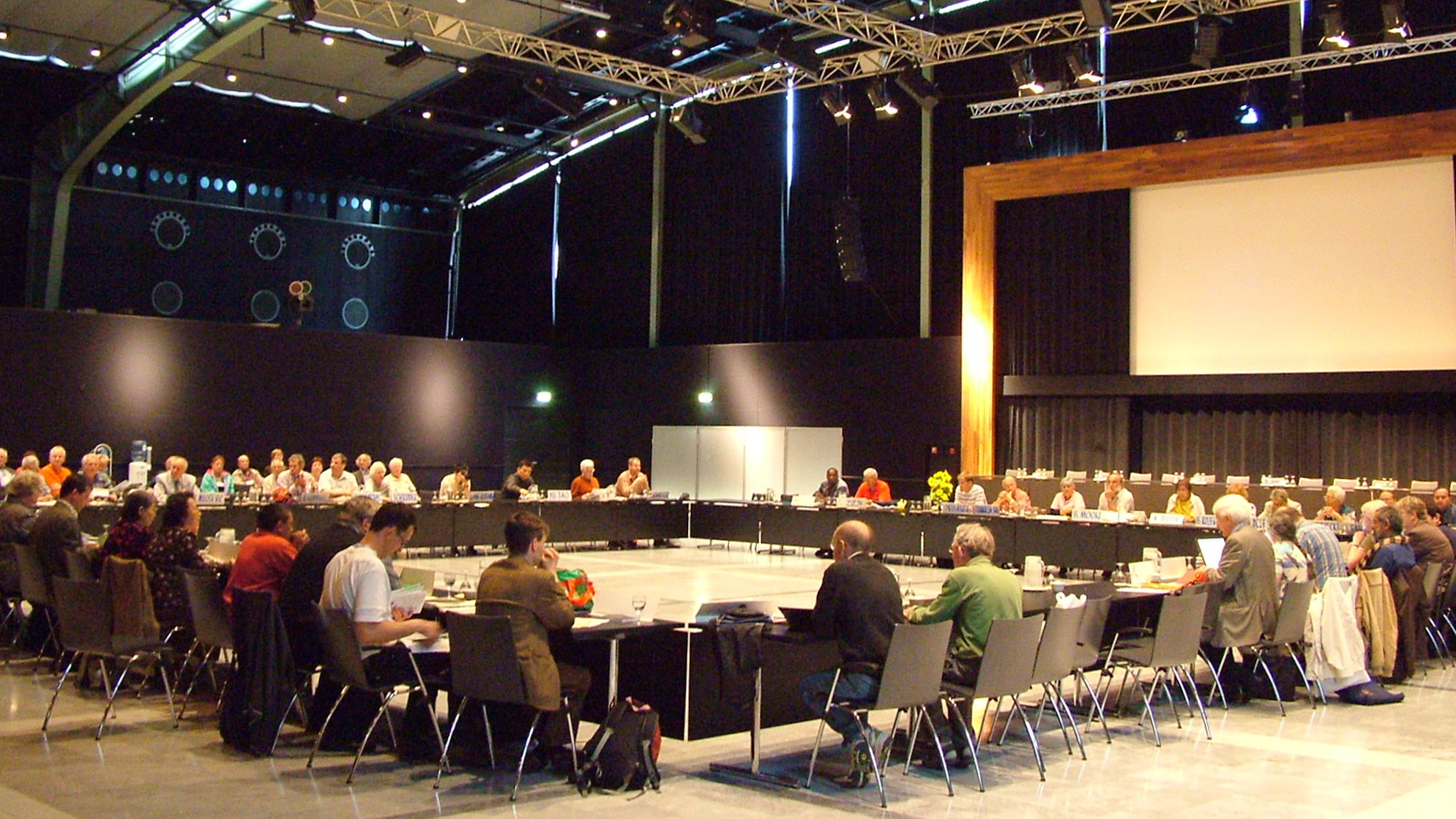 Universala Kongreso de Esperanto, Roterdamo 2008. Komitatkunsido.